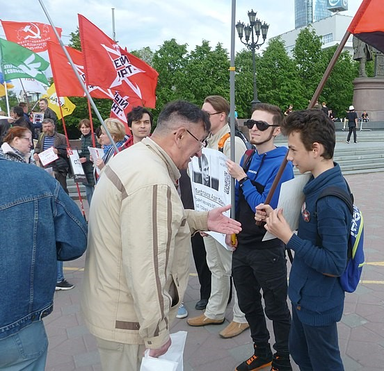 Виктор Пестов и юный анархист на пикете в Екатеринбурге 6 июня 2019 года